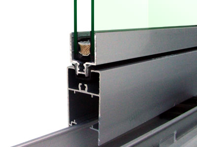 あんみつガラス